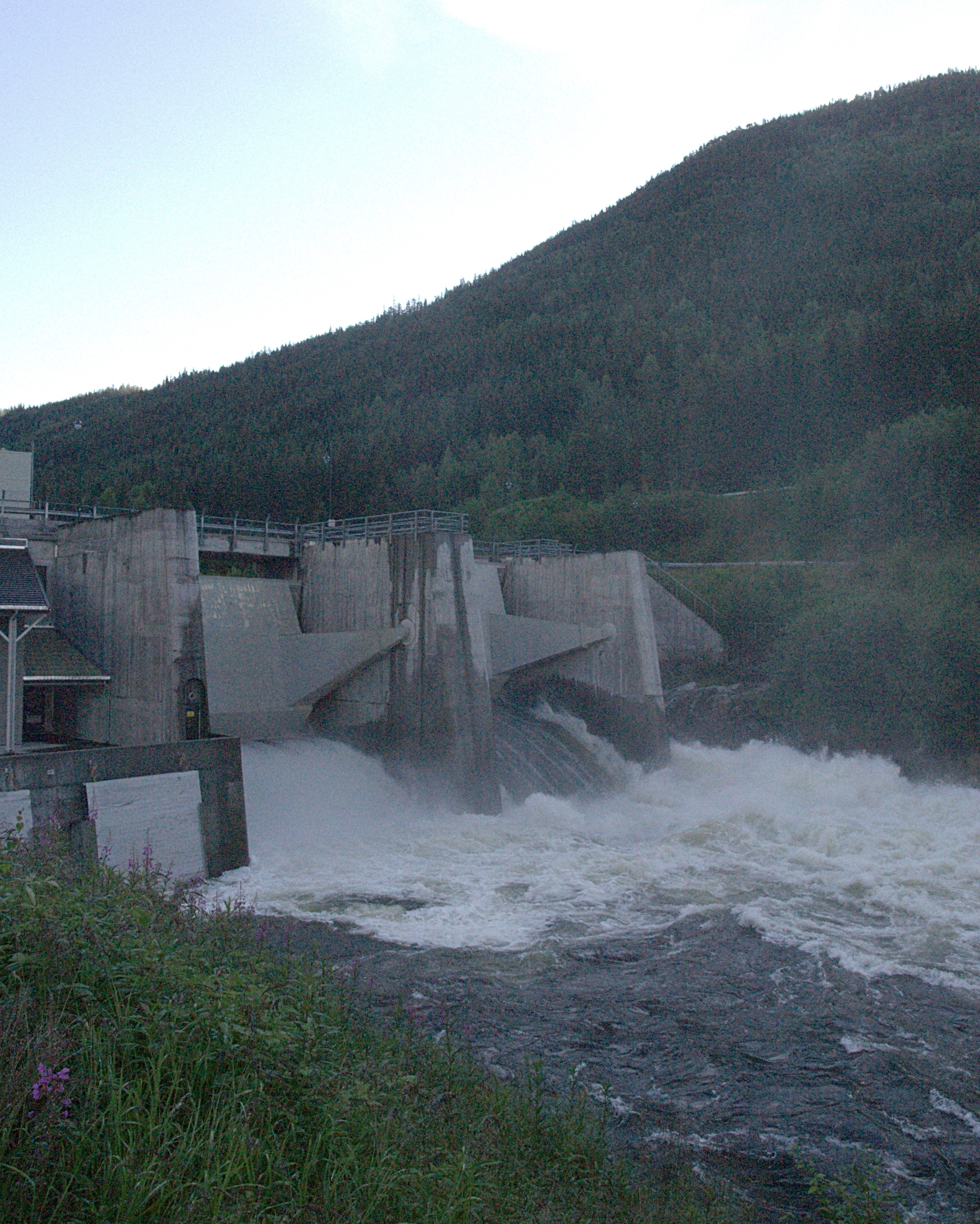 Eid kraftverk